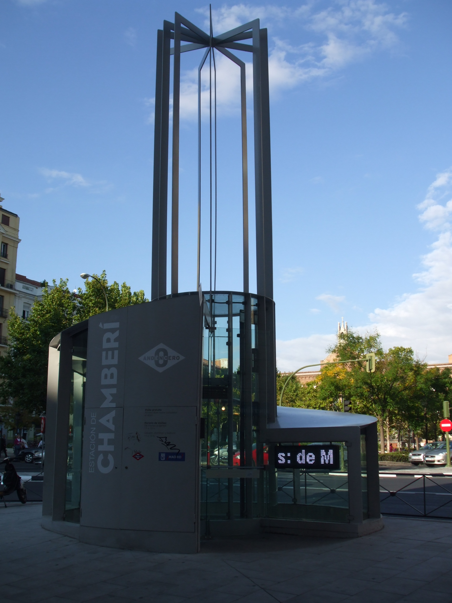 Estación de Chamberí acceso exterior